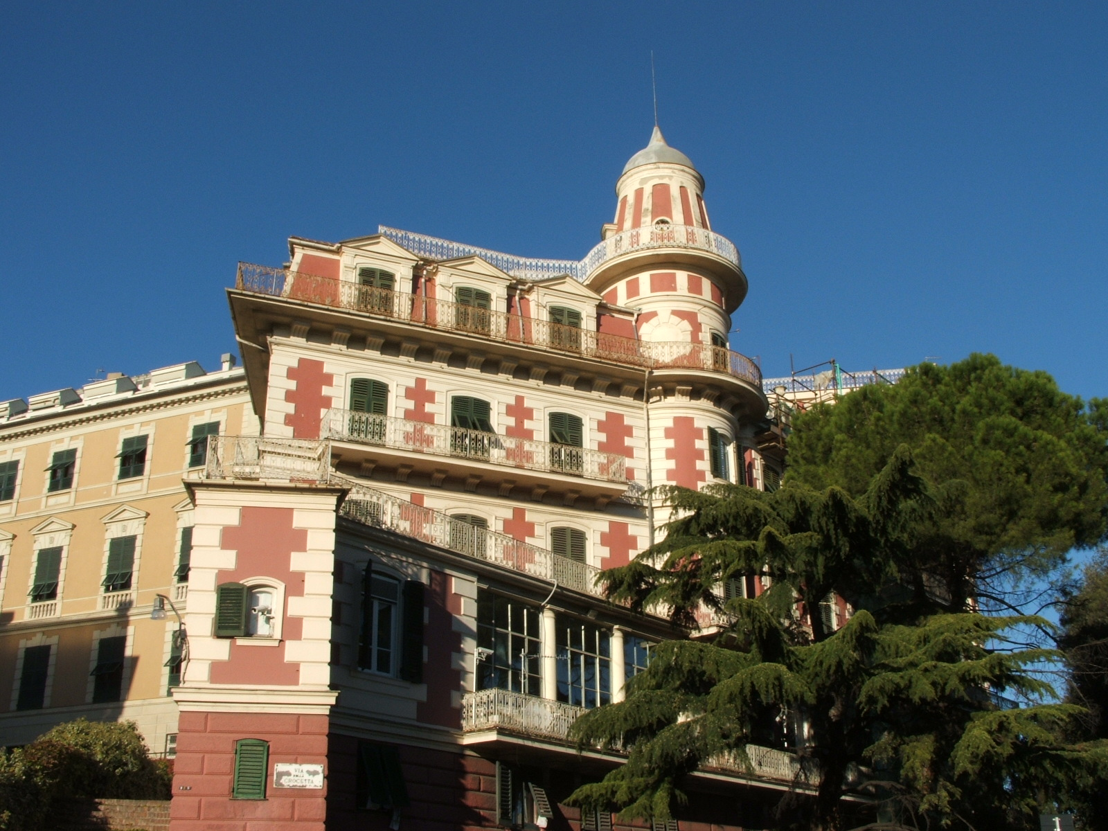 Immagine da Genova